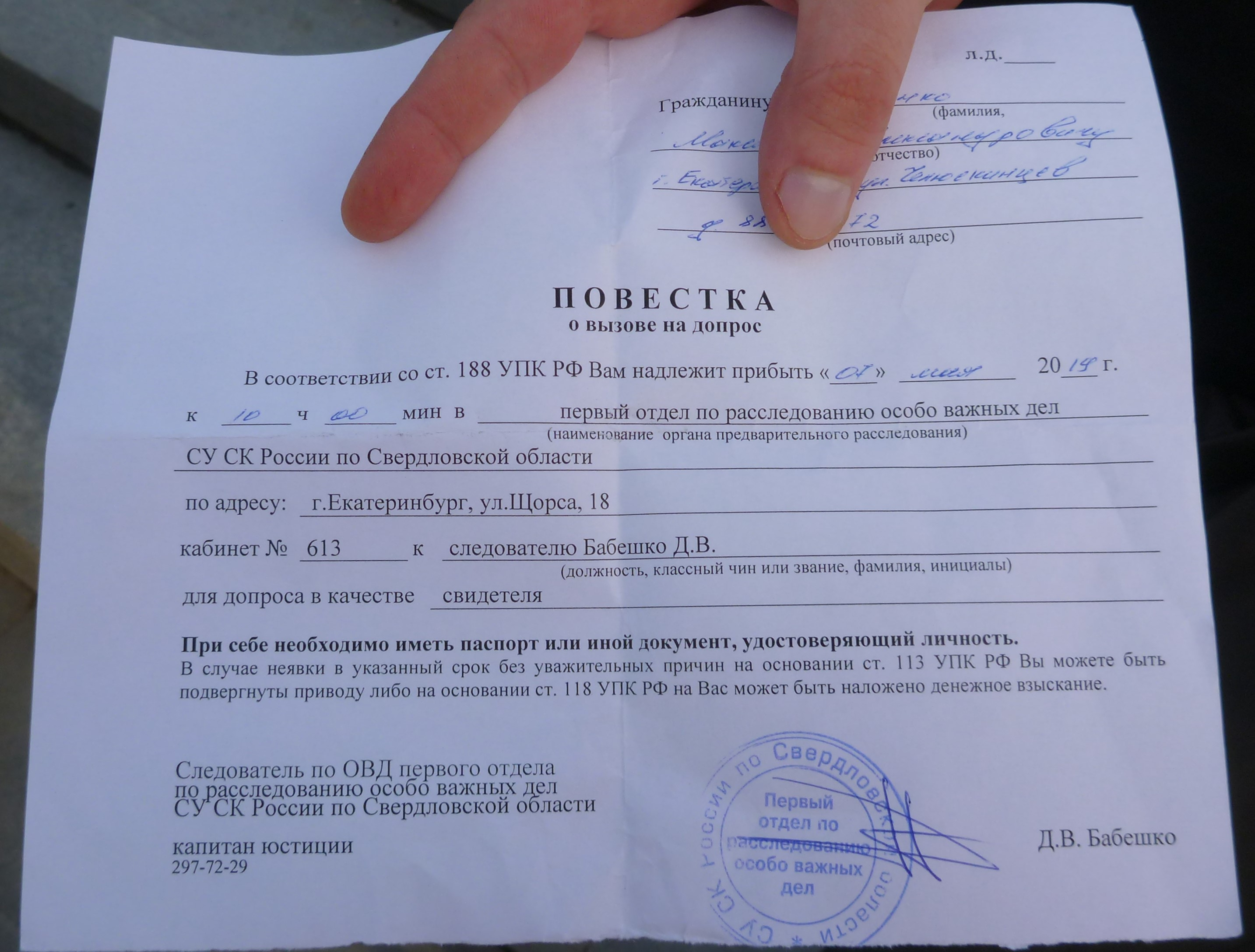 Повестка по делу Верникова Максиму Александровичу Зубенко на 7 мая 2019 года